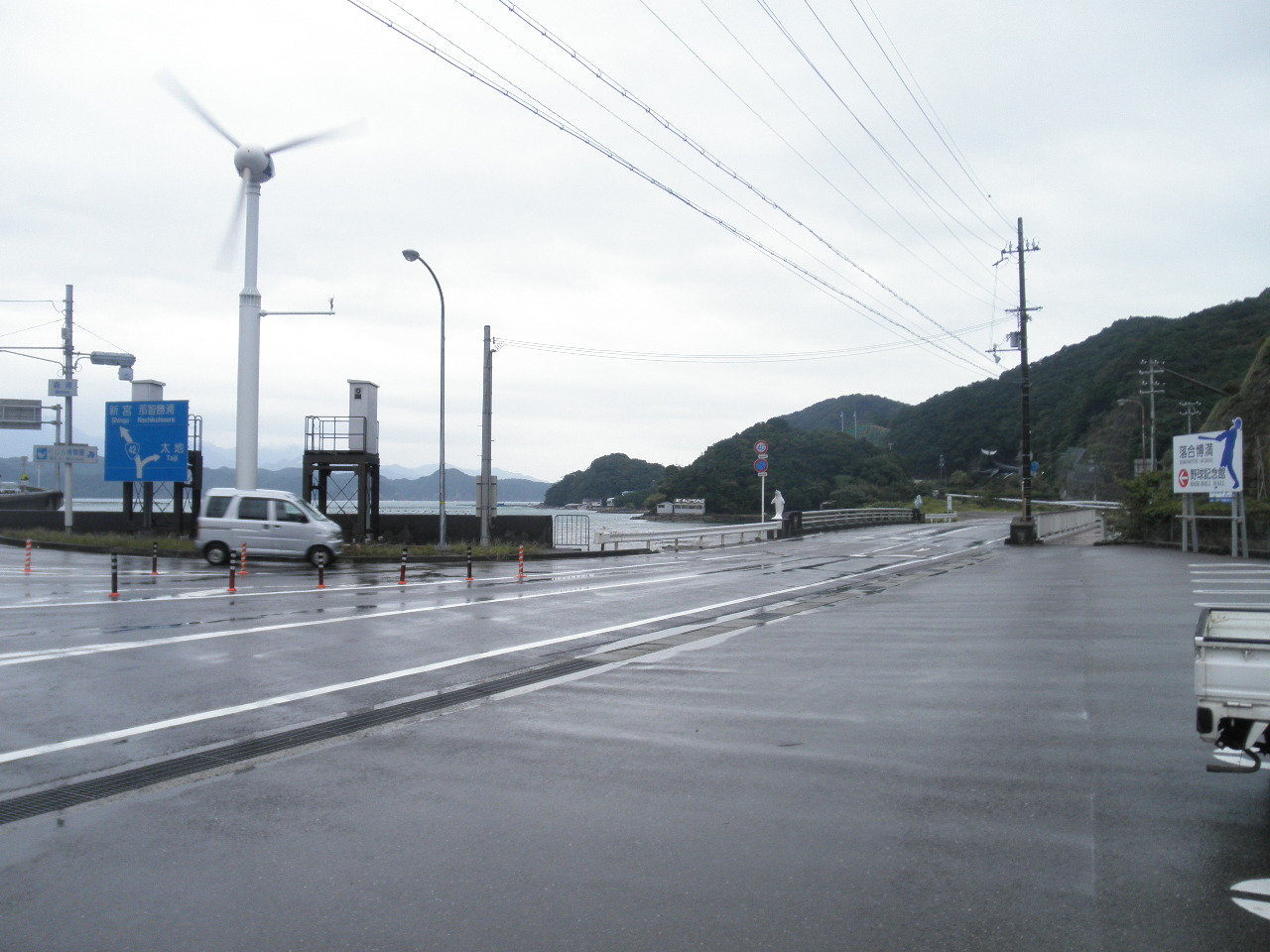 和歌山県東牟婁郡太地町森浦